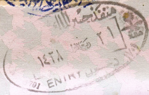 Saudi Arabian visa